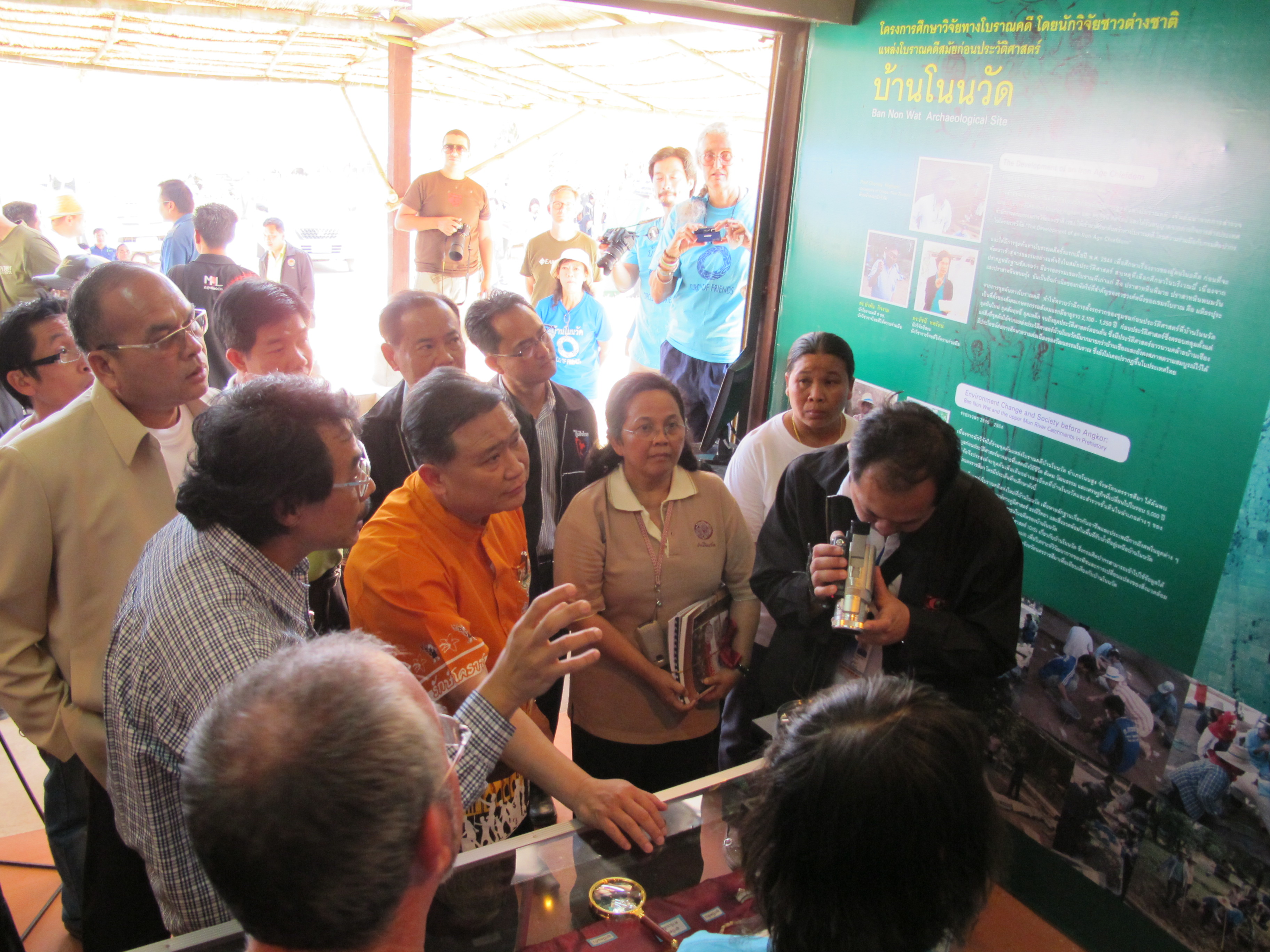 ภาพผู้ราชการจังหวัด เยือนบ้านโนนวัด